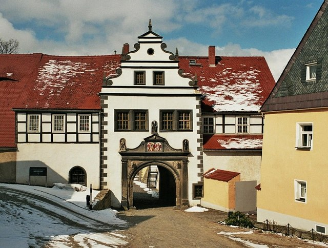 Blick auf das Torhaus von Schloss Lauenstein im Osterzgebirge (Lauenstein castle)